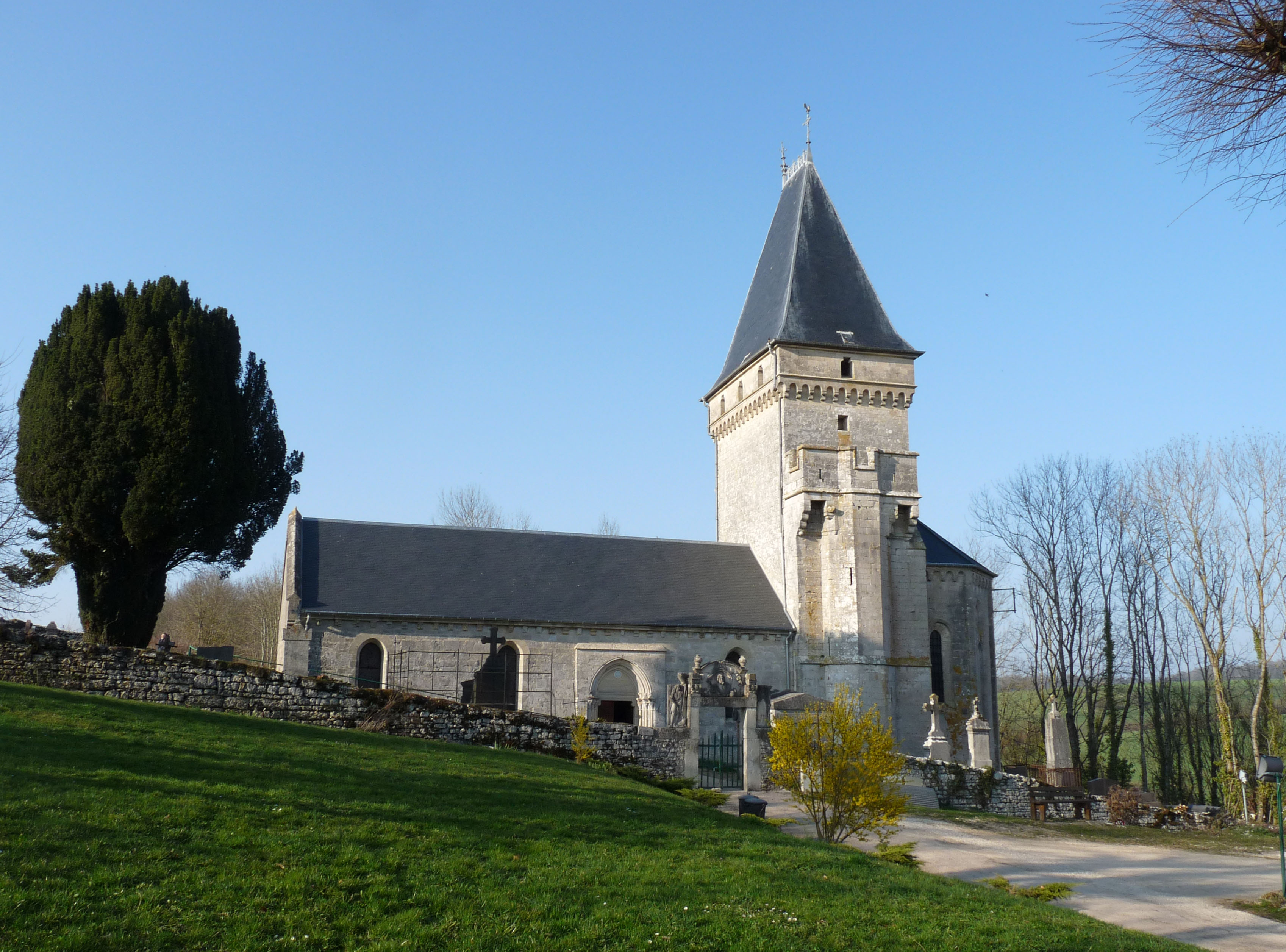 Eglise de Ribeaucourt (Meuse)